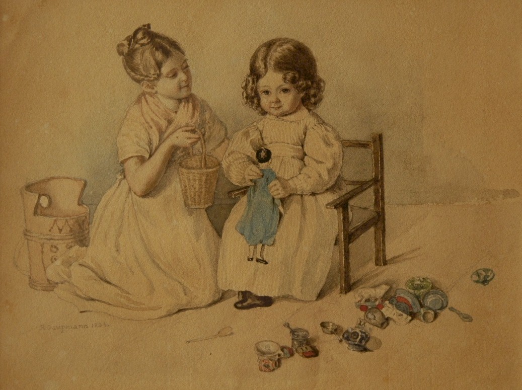 Abbildung des Aquarells Spielende Kinder von Rudolf Gaupmann